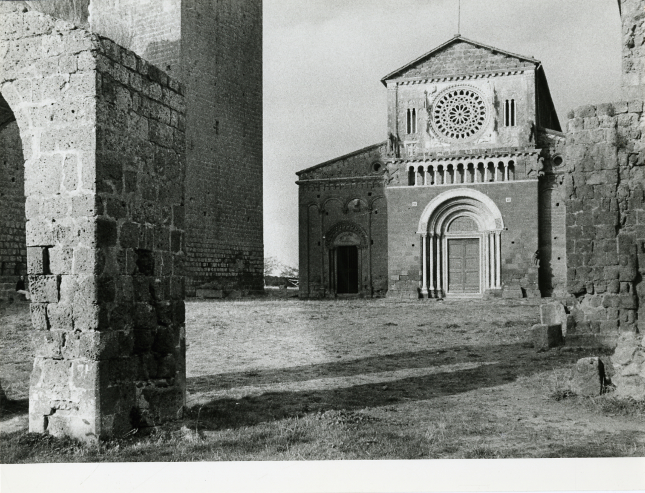 Tuscania. Chiesa di San Pietro e Abbazia di San Giusto. Serie fotografica : Tuscania, 1970 / Paolo Monti. - Stampe: 8 : Positivo b/n, gelatina bromuro d'argento/ carta, 24x30. - ((Al verso delle stampe manoscritto numero di negativo corrispondente: 1518/68, 1528/33, 16492 Al verso di alcune stampe manoscritto: "Portale Chiesa dell'abbazia di San giusto (Tuscania)", "Tuscania Vista da sud", Tuscania S. Pietro - abside", "Tuscania S. Pietro termine della navata destra", Tuscania San pietro2, . Sul coperchio della scatola manoscritto a pennarello nero: "Città storiche/ Lazio". - Occasione: Documentazione Etruria Meridionale. - Fonte: Agenda di Paolo Monti: Monti - Agenda 1970 (1970), presso Archivio Paolo Monti